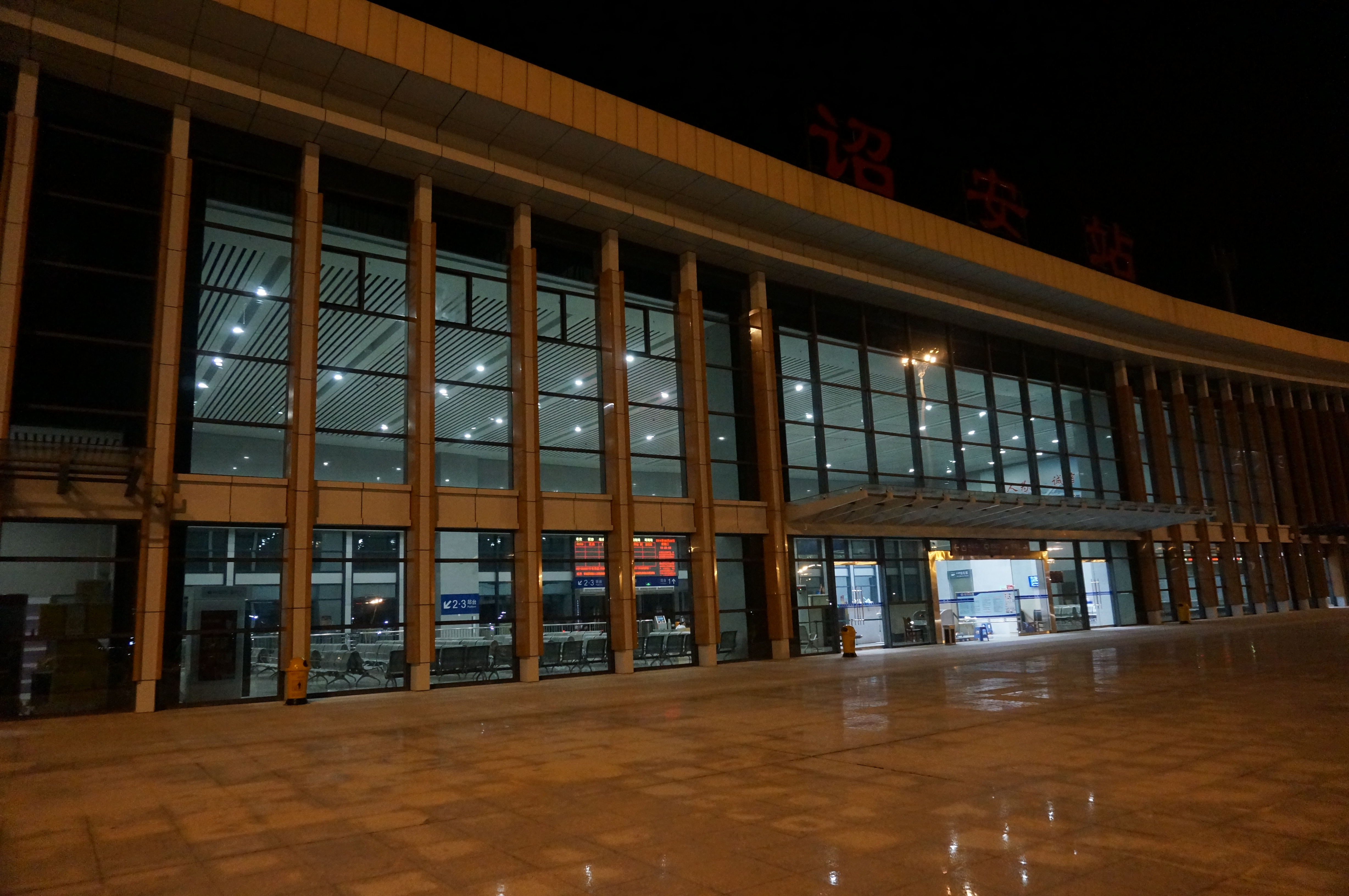 诏安站夜景。